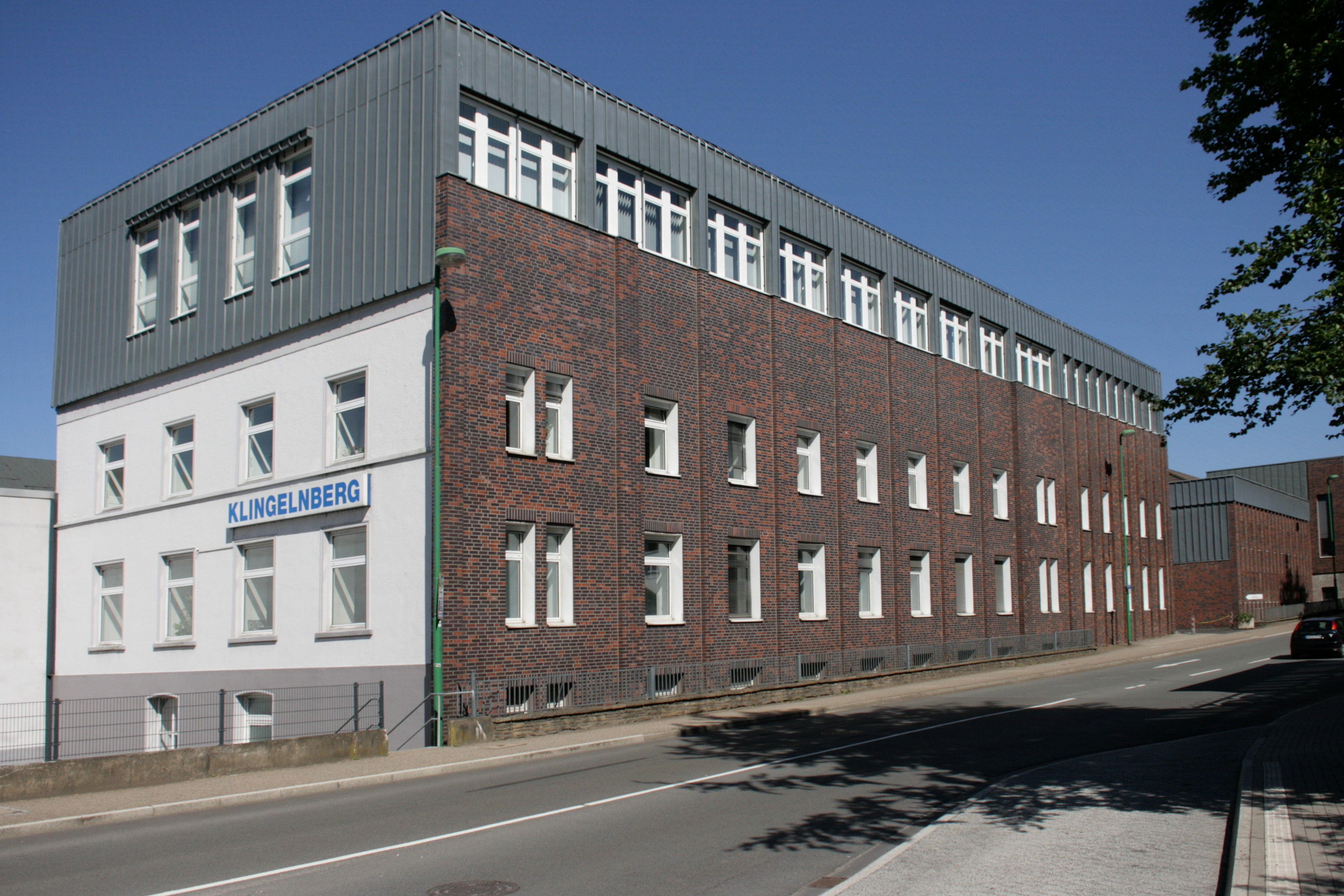 Klingelnberg GmbH, Peterstraße 45 in Hückeswagen